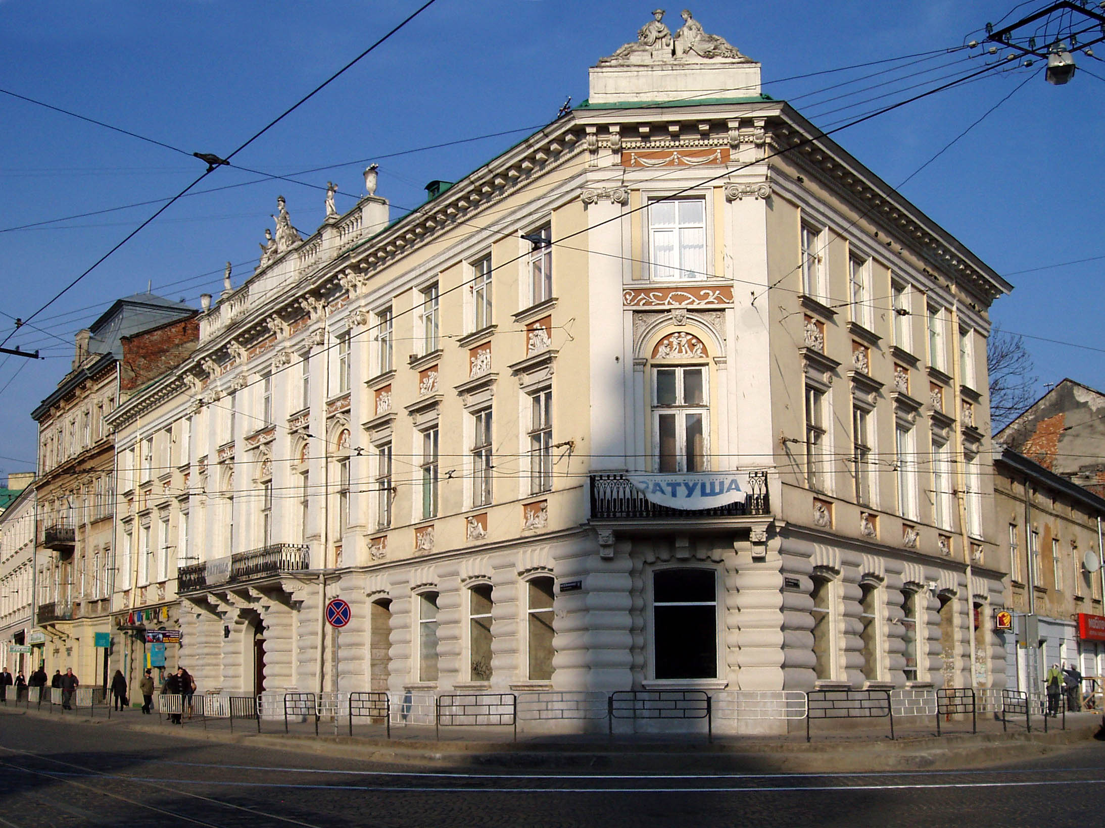 Будинок № 8 на вулиці Винниченка у Львові.